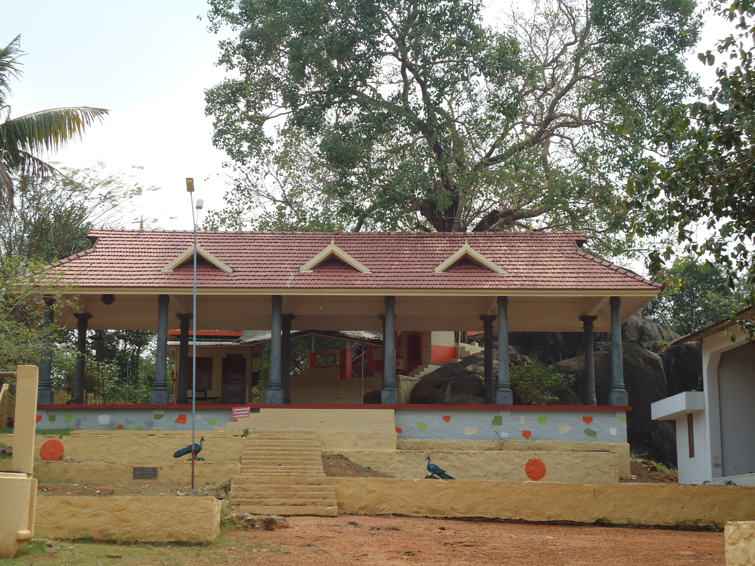 Munikkal Guhalaya Temple Chengamanadu Front